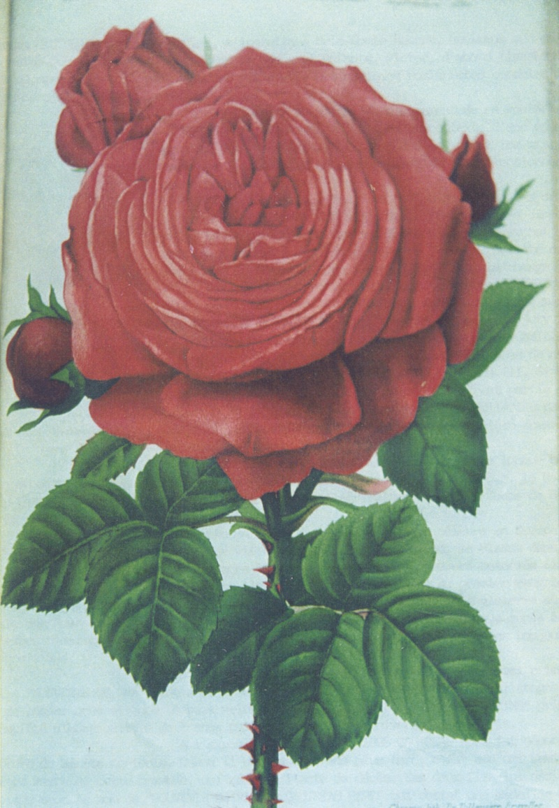 Rose « Camille Bernardin » 1865, créée par Victor Étienne Gautreau